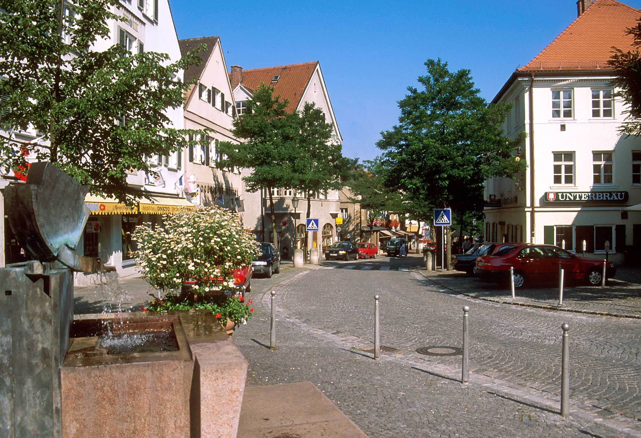 Scorcio del cantro storico di Dachau-Unterbräu